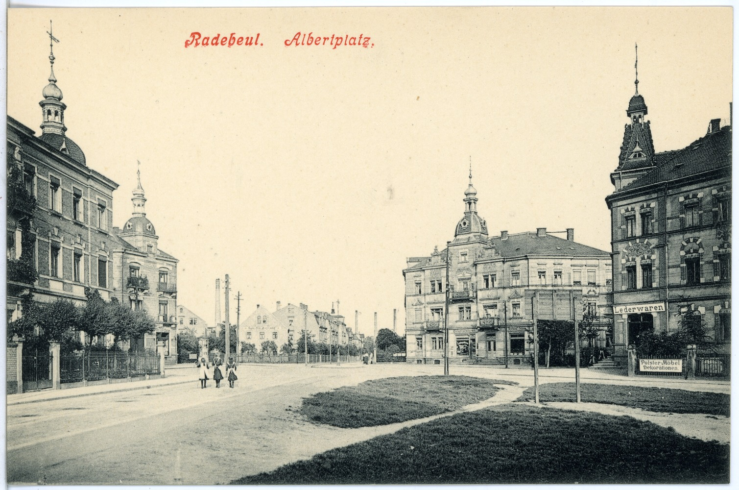 Radebeul; Albertplatz This postcard is from publisher Brück & Sohn in Meißen ( postcard has a unique number 17860 and is available in a higher resolution at the publisher. This images was uploaded in a cooperation project between Wikipedians and the publisher.